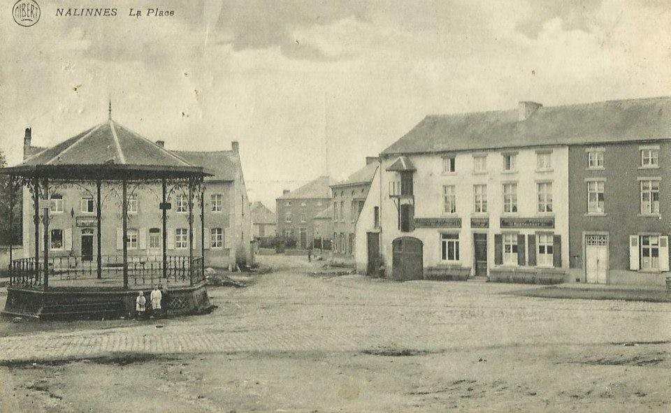 Carte postale ancienne, vue sur la place du Centre à Nalinnes-Centre et sur le Kiosque à musique en 1919